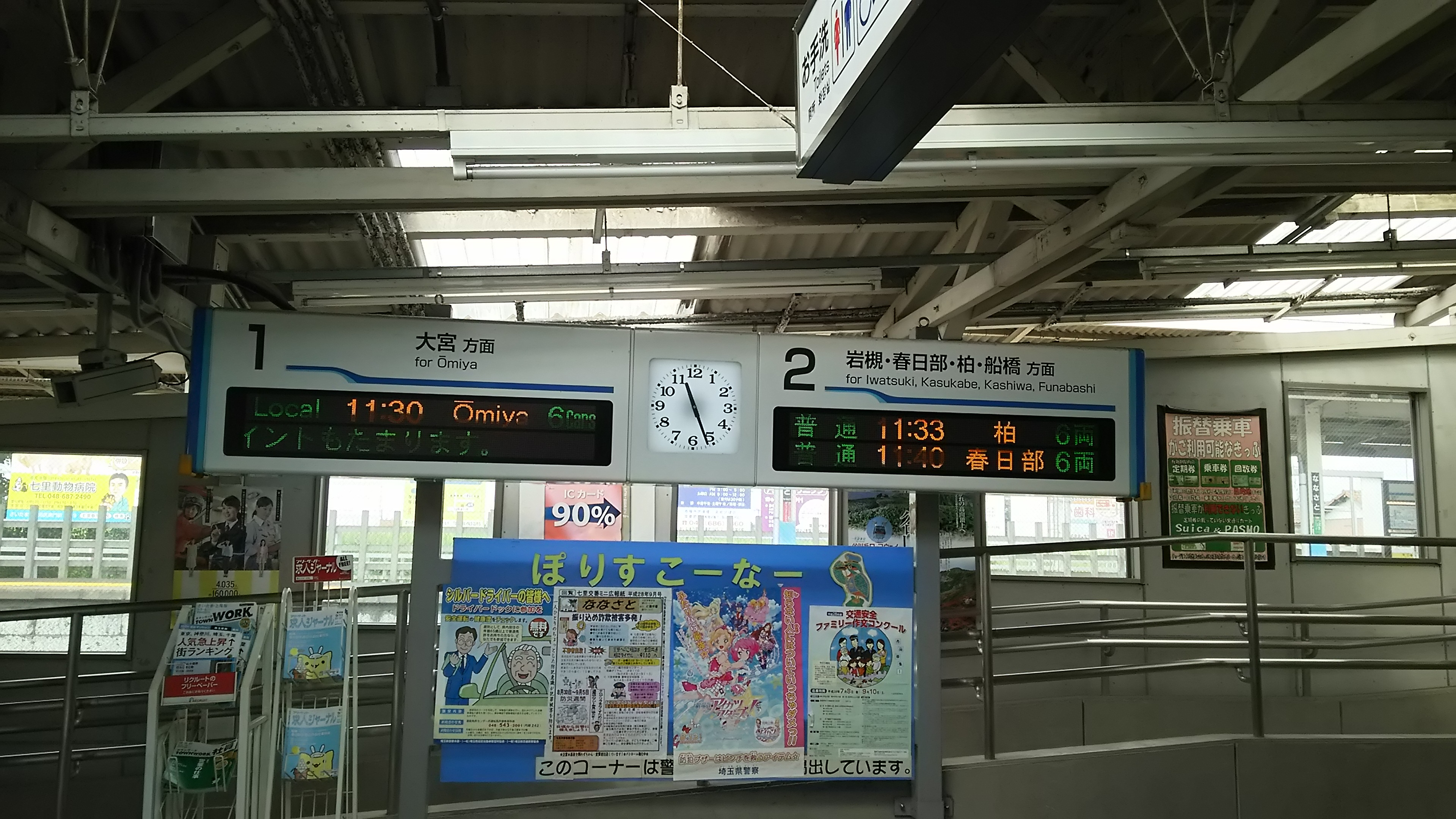 七里駅 発車案内標（改札口）